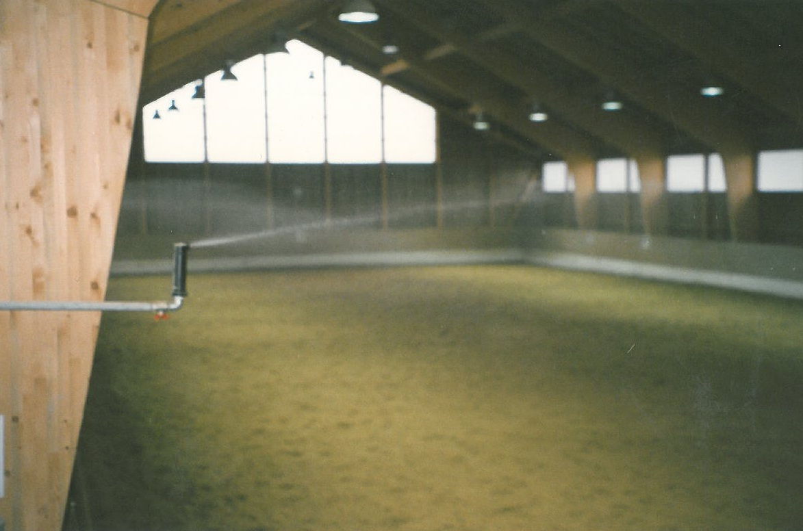 Reithallenberegnung mit Seitenregnern